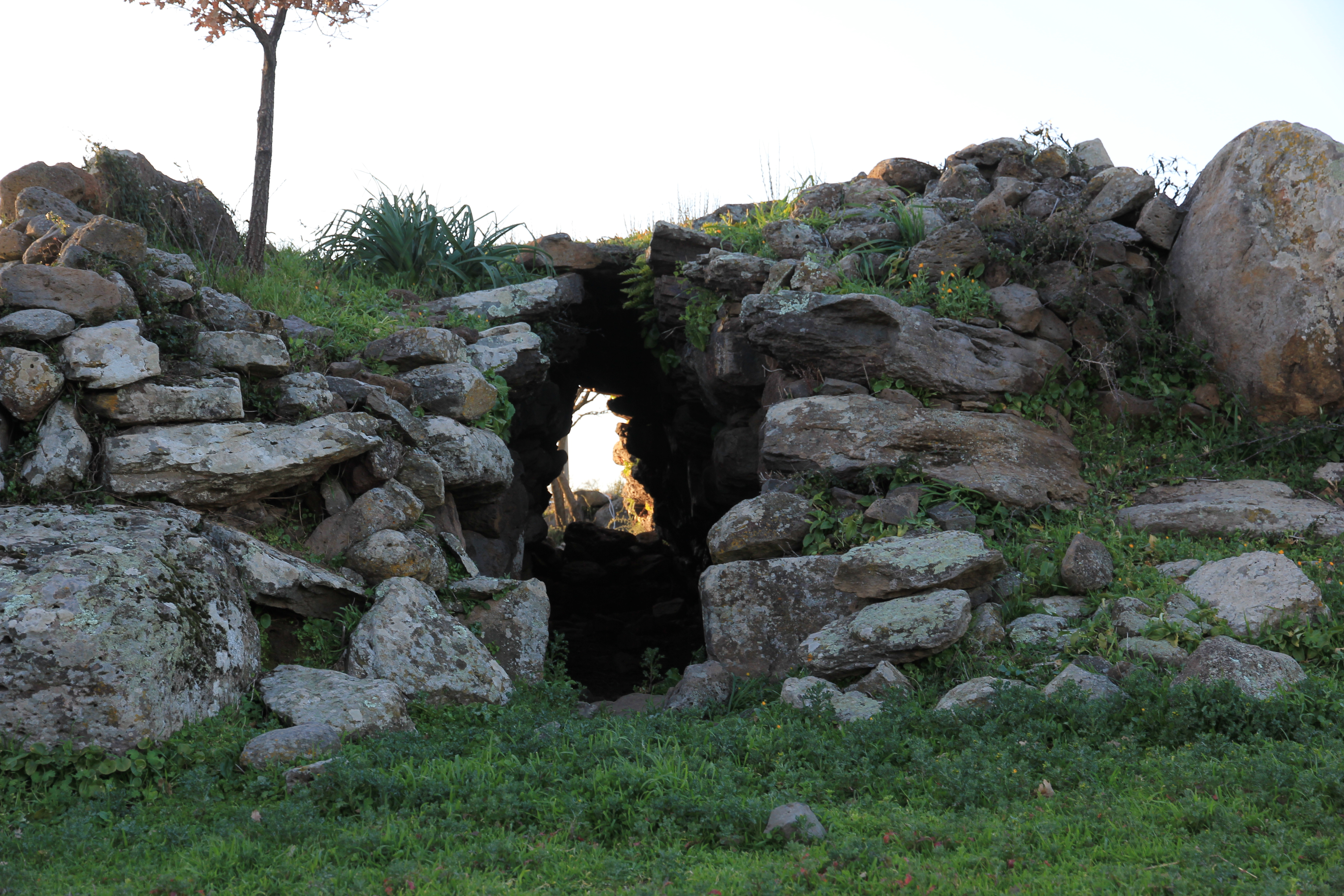 Birori - Tomba dei giganti di Lassia o Noazza III